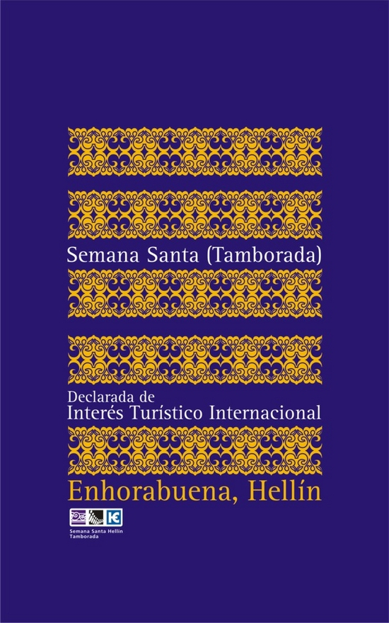 Declaración de Interés Turistico Internacional Semana Santa de Hellín